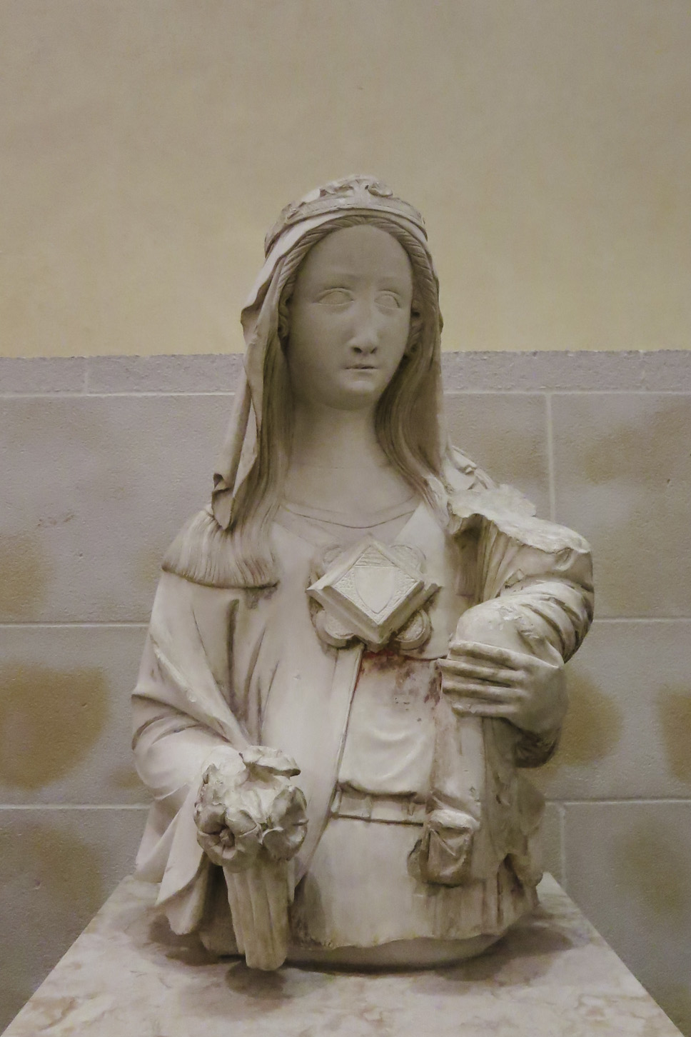 Mestre Pero, Virgem com o Menino, séc. XIV, Museu Nacional de Machado de Castro